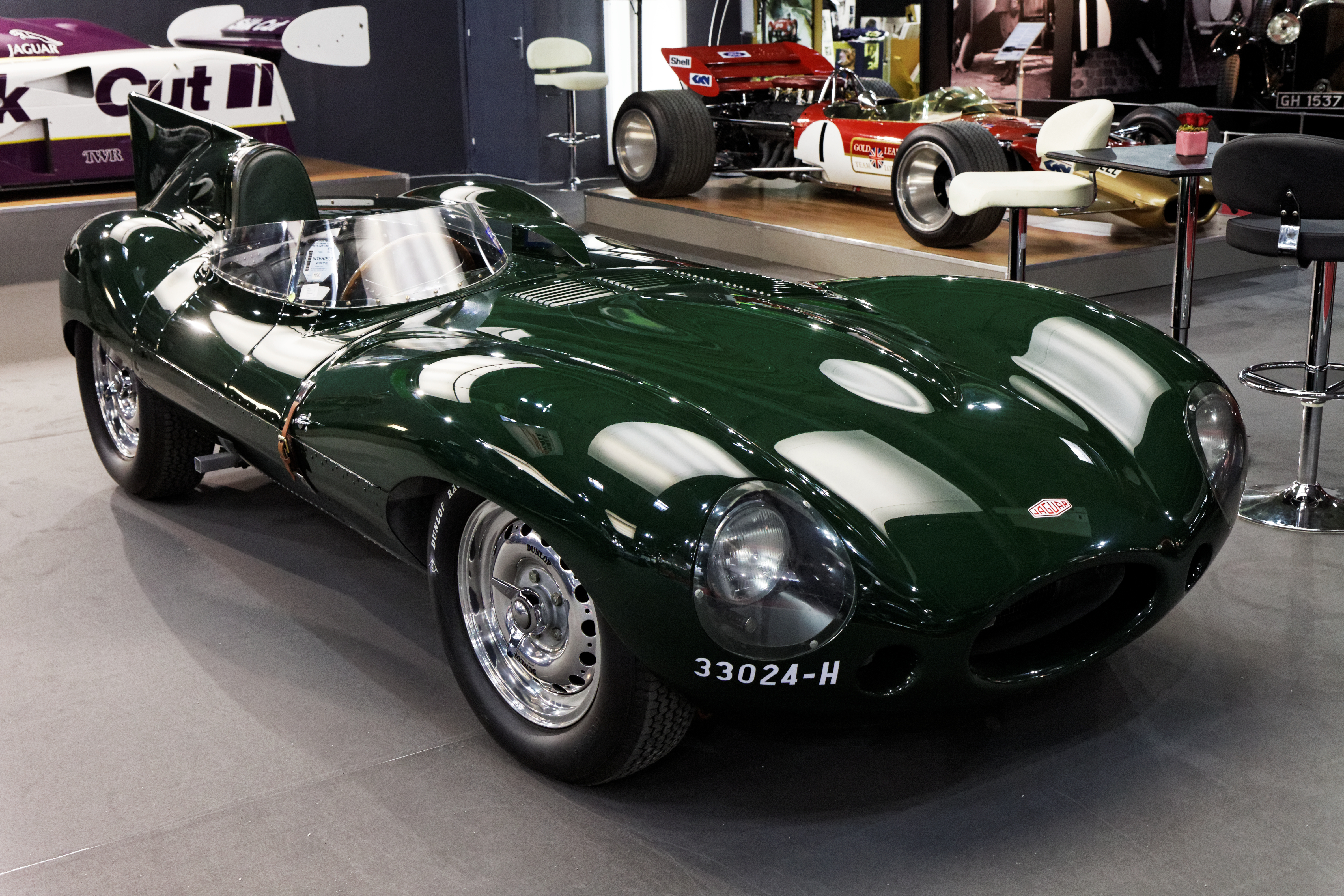 Une Jaguar D Type présentée lors du salon Retromobile 2013.